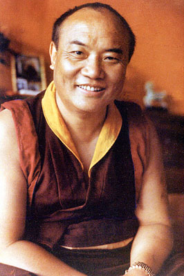 16th Karmapa Rangjung Rigpe Dorje